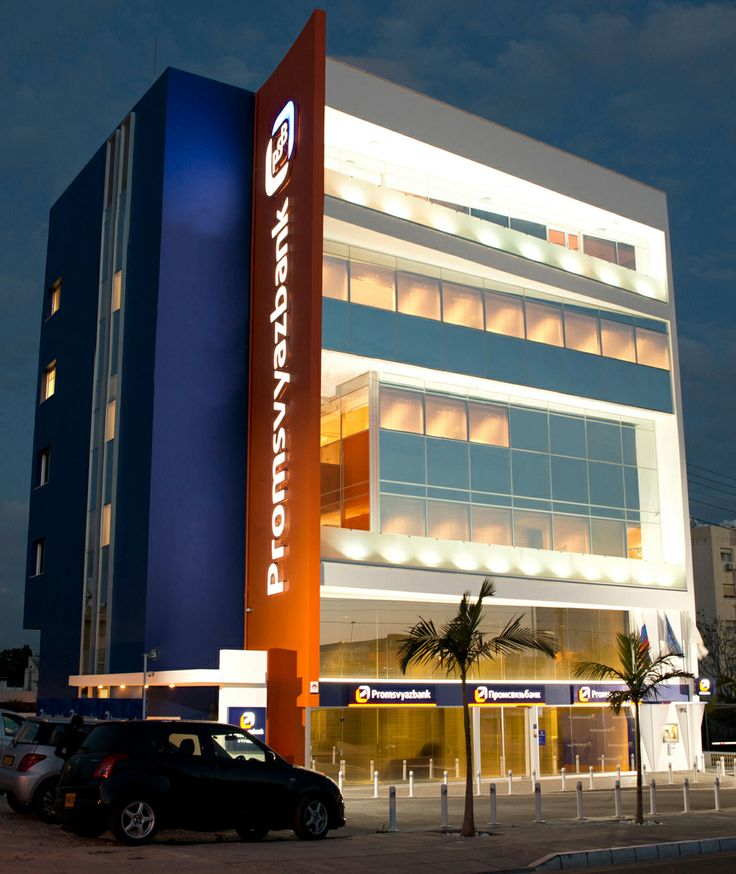 Офис Промсвязьбанка на Кипре (открыт в 2002 году)